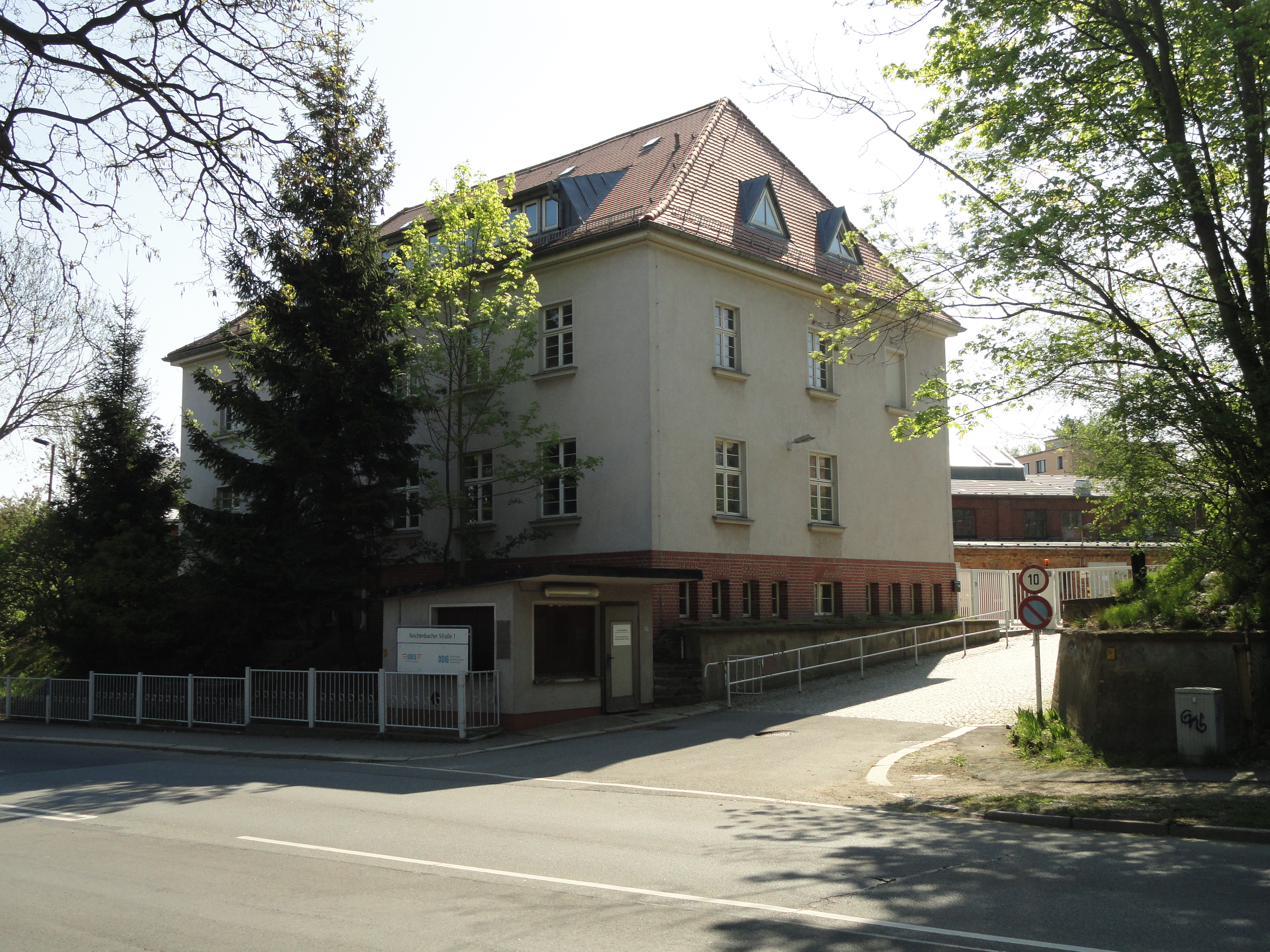 Zufahrt zum Bahnbetriebswerk (BW) Görlitz von der Reichenbacher Straße